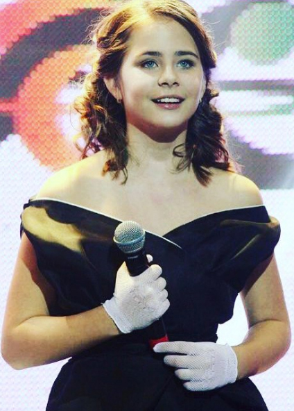 Анна Воронова